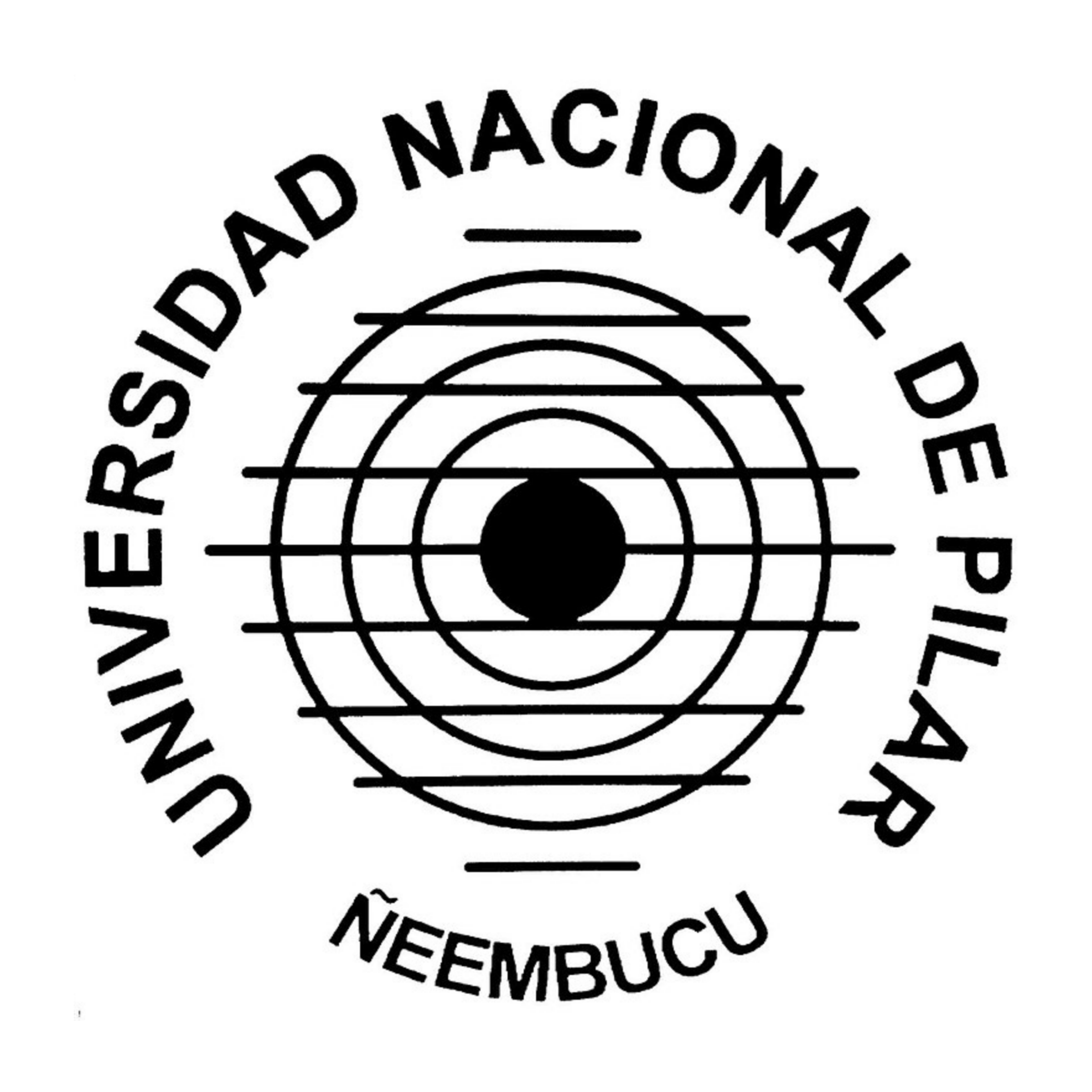 Primera_imagen_UNP